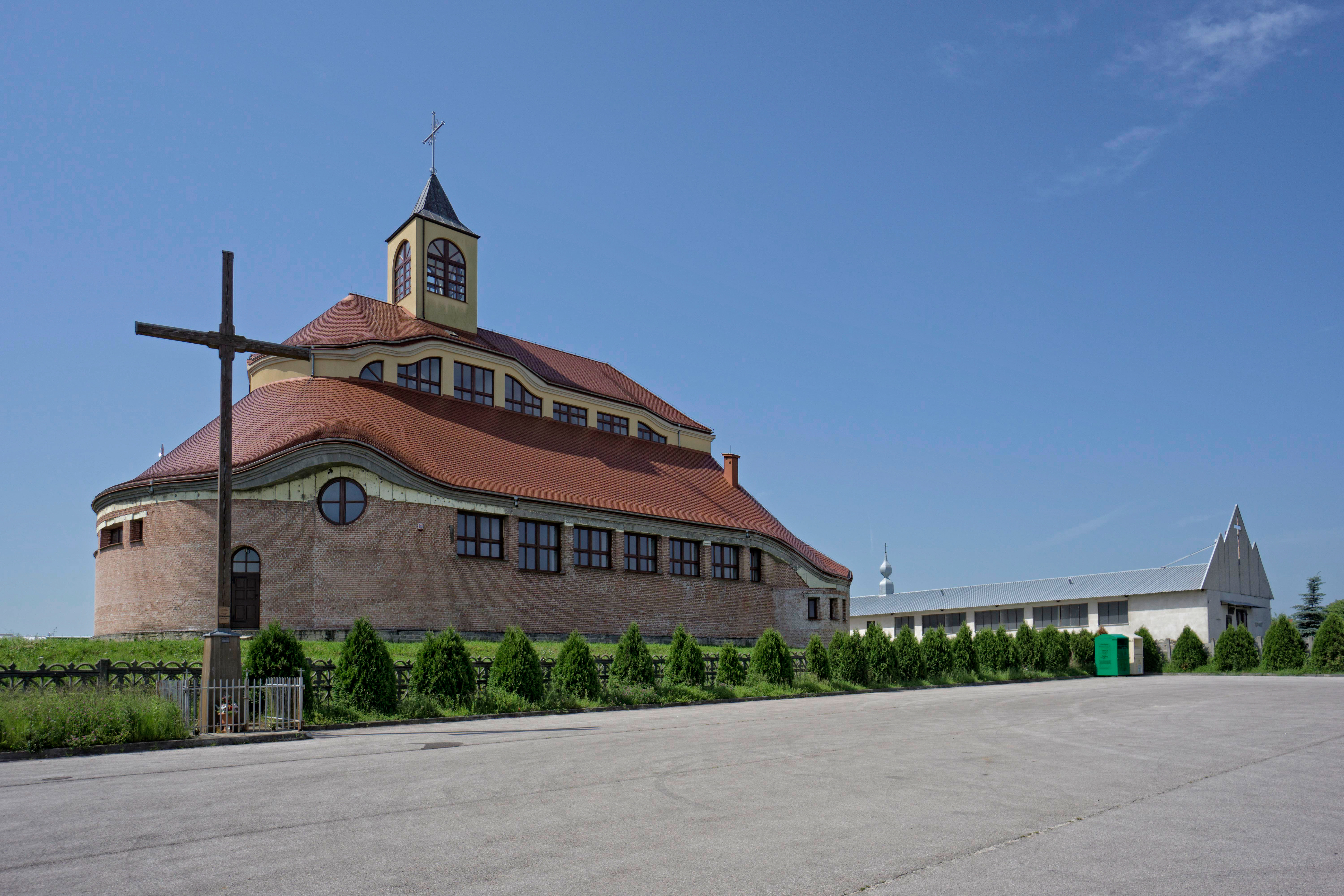 Kościół św. Kazimierza w Bilczy